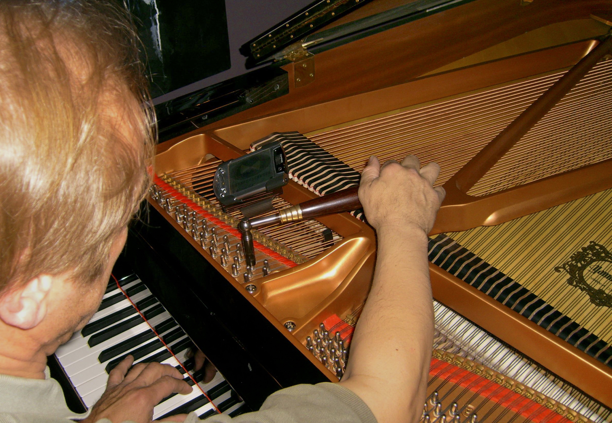 Pianosstëmmer Source:Foto vum Commons-User PlayMistyForMe, iwwerschafft (selektiv Beliichtung} vum Benotzer:Cornischong